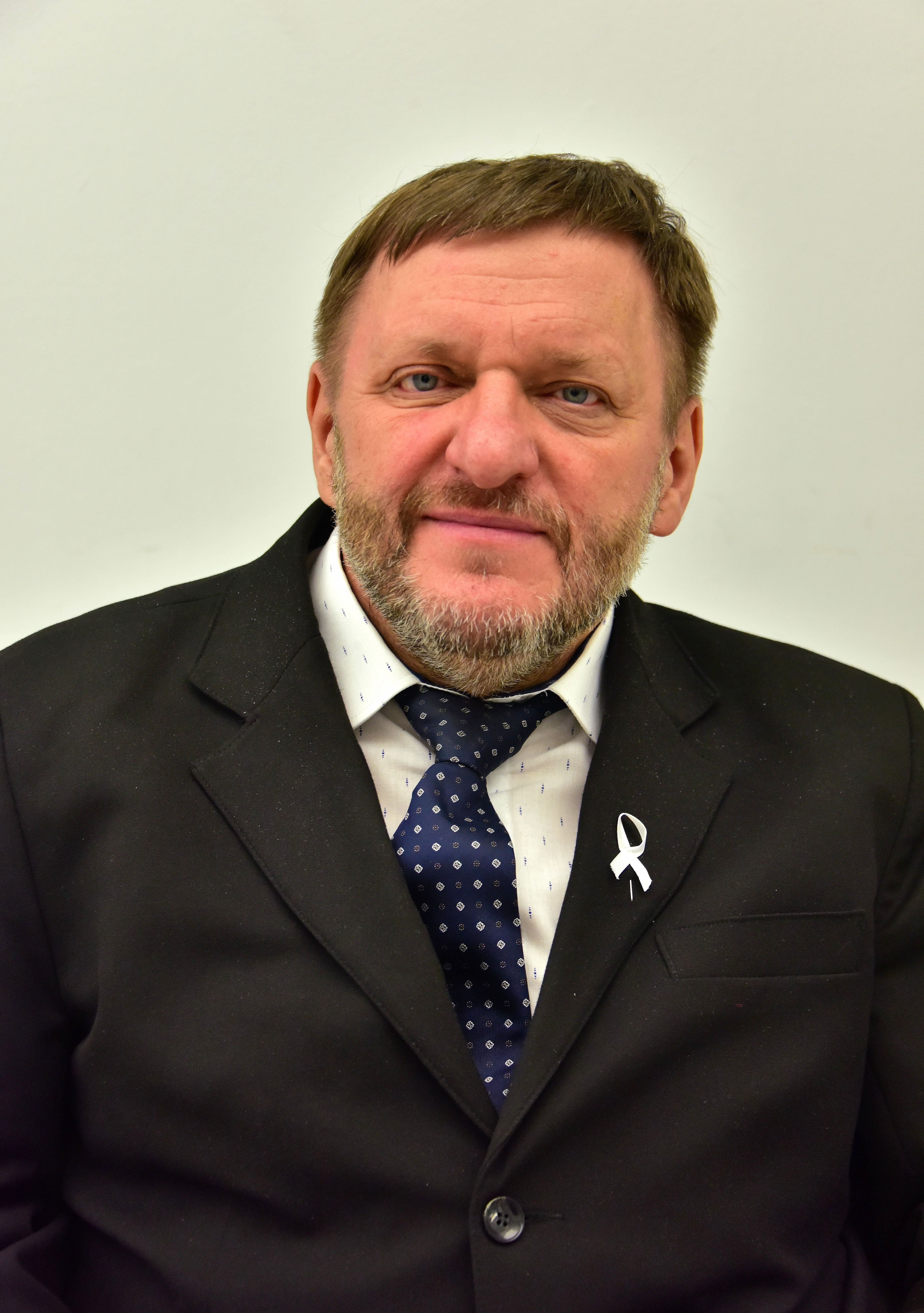 Poseł Sławomir Piechota w Sejmie